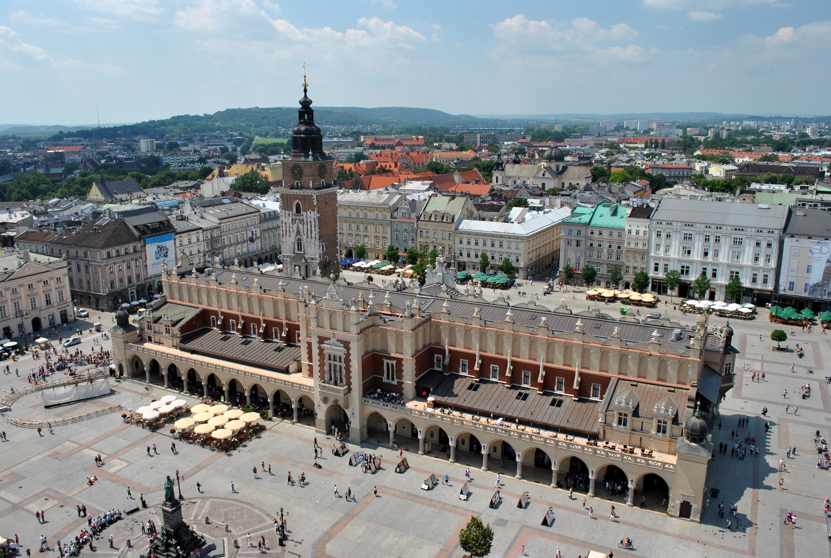 Kraków, Rynek Główny - sukiennice (widok z wieży Kościoła Mariackiego), 1344-1392, 1557-1559, 1875-1879